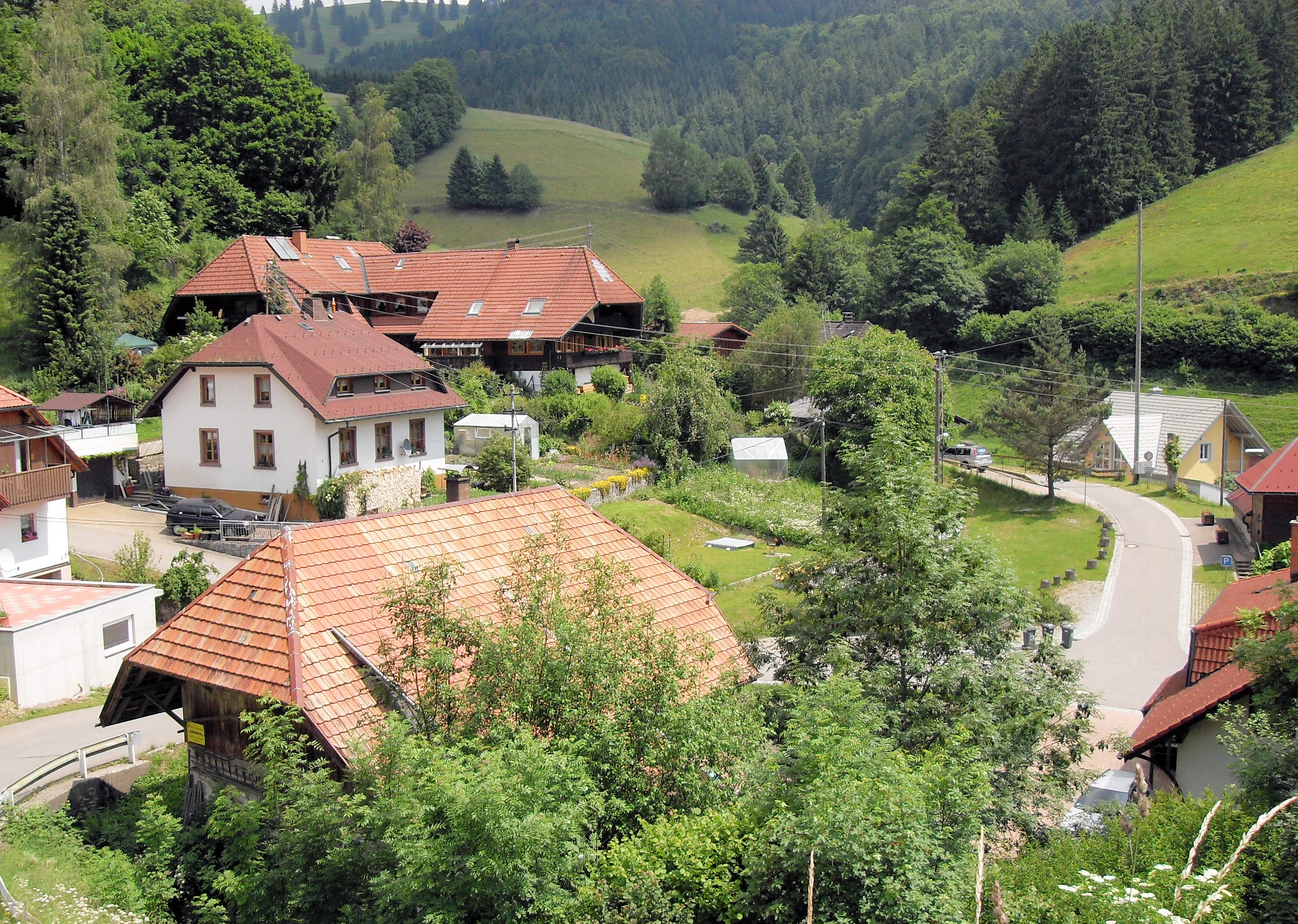 Blick aus Südwesten auf Böllen, Schwarzwald, Deutschland